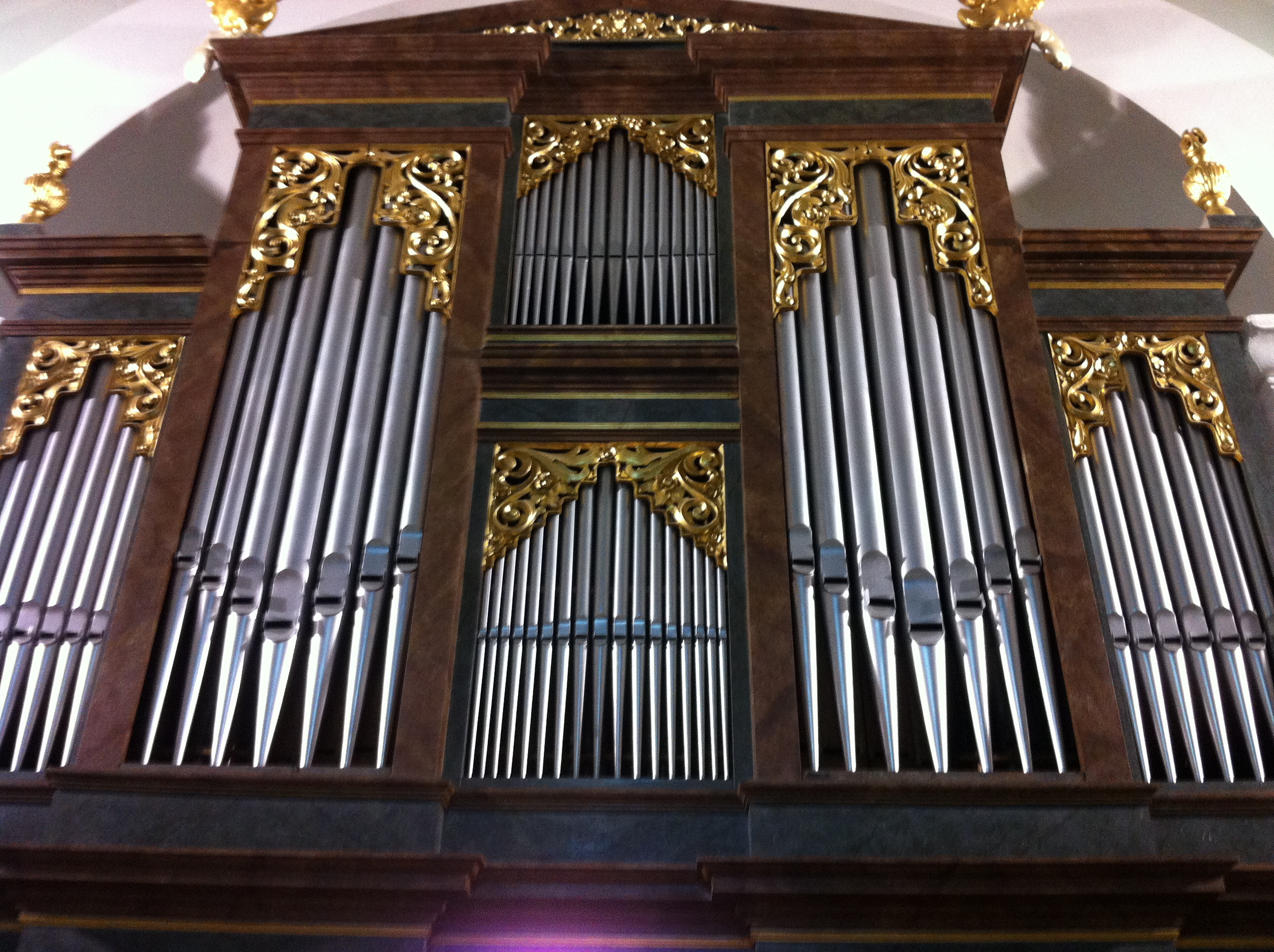 Kirche Srbska Kamenice Hauptorgel Prospekt